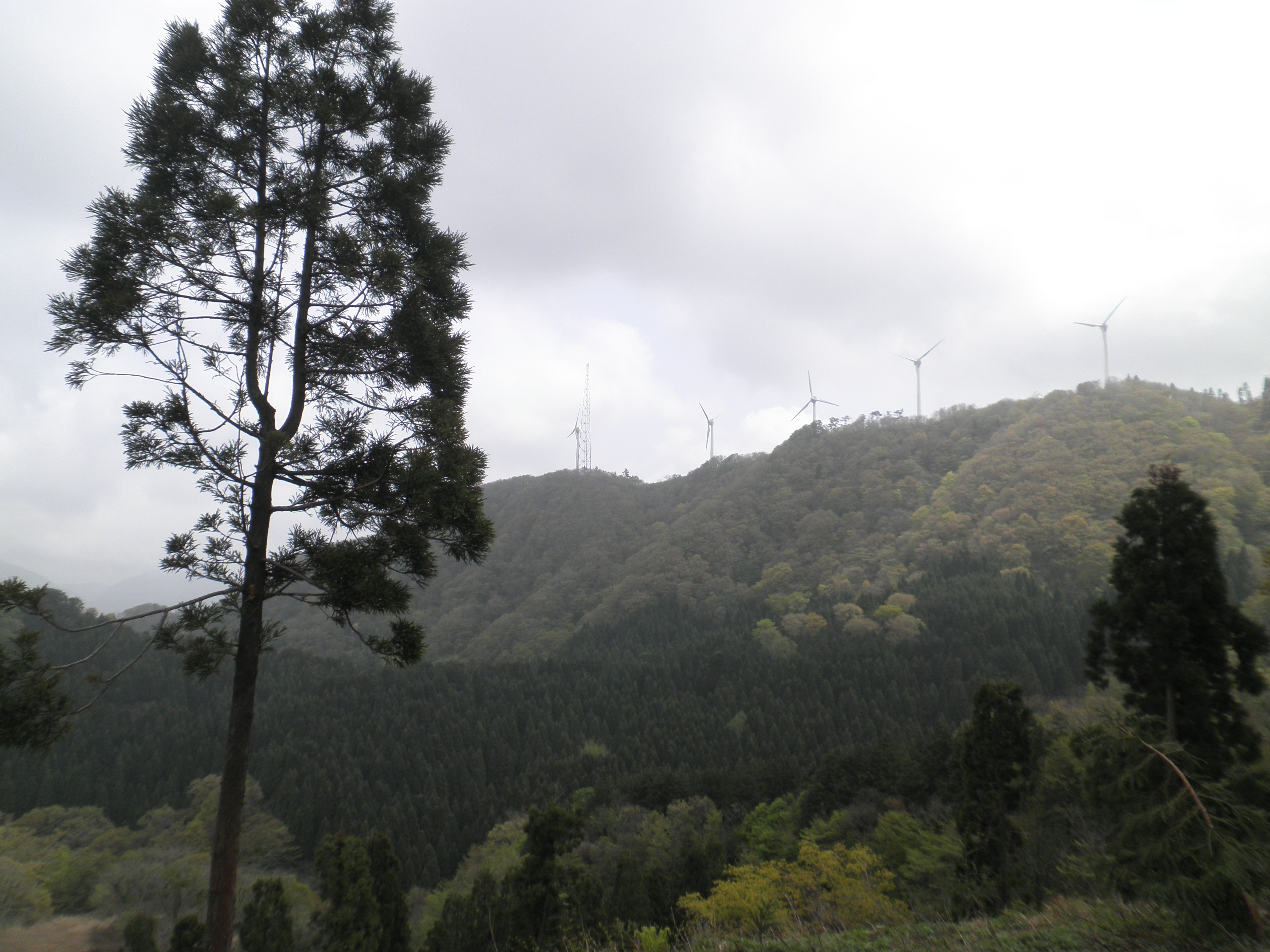 京都府伊根町にある太鼓山風力発電所、京丹後市域から撮影